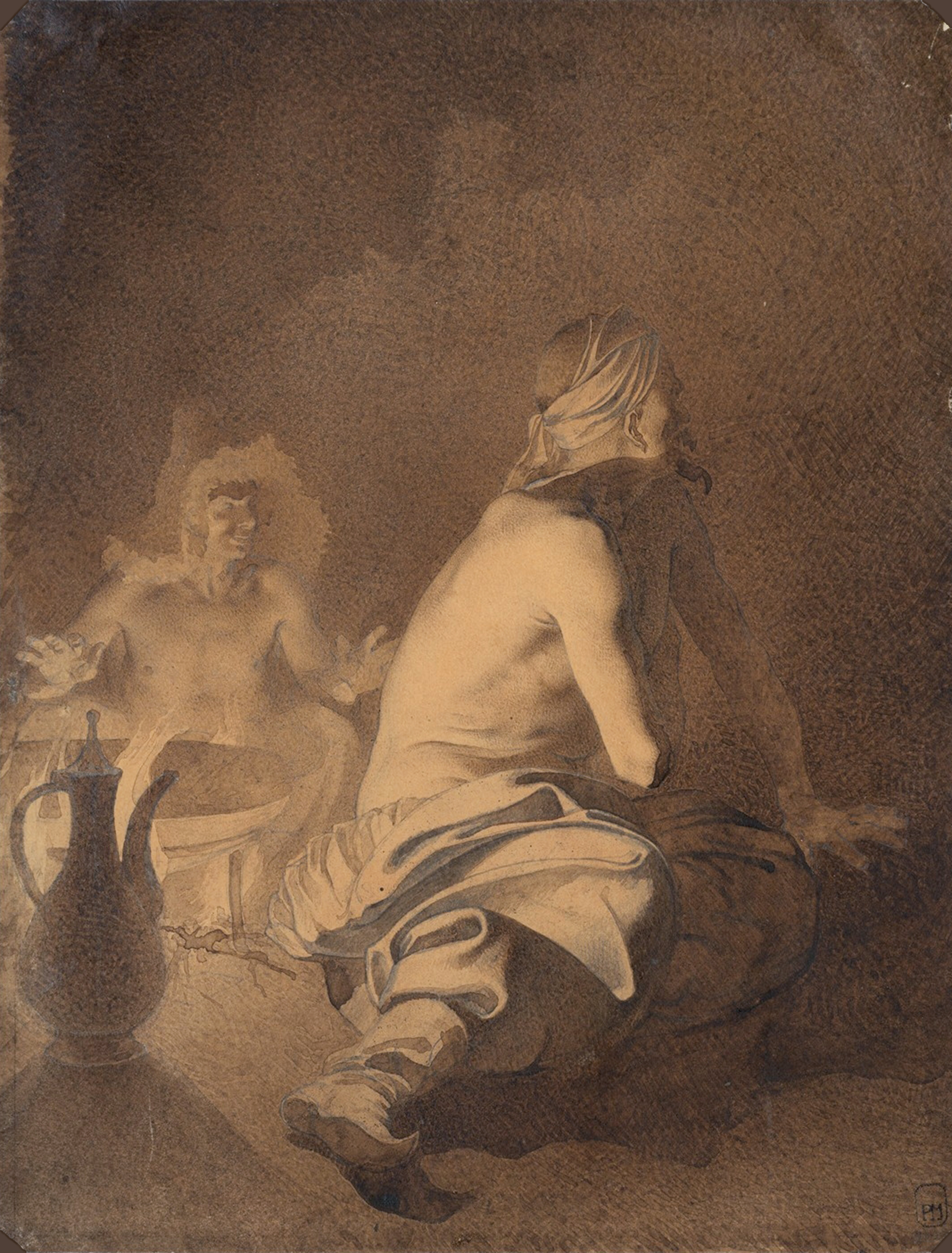 Тарас Шевченко. Казахи біля вогню. 1848 Праворуч унизу штамп: РМ. На звороті внизу поверх стертого напису зазначено олівцем: 18 29/ХІ 49. Праворуч ледве помітний напис олівцем: Оренбургъ. Т.Шевченко. Можливо, на малюнку зображений бакса (знахар), з яким зустрічались учасники експедиції на Косаралі. Про нього згадує О.І. Бутаков у листі до своїх рідних. Малюнок спочатку належав В.М.Лазаревському, згодом став власністю його сина і внука. У 1900 р. його придбав відомий московський колекціонер С.С.Боткін від якого він перейшов до Російського музею. З 1940р. – в Україні. Напис (18 листопада 1849 р., Оренбург) може вказувати не тільки на дату, коли Шевченко подарував малюнок В.М.Лазаревському, а й на можливість його завершення після Аральської експедиції. Олівець. Сепія Місце створення: Казахстан, Кизилординська область, Аральський район, острів Косарал. 23,0 × 17,6